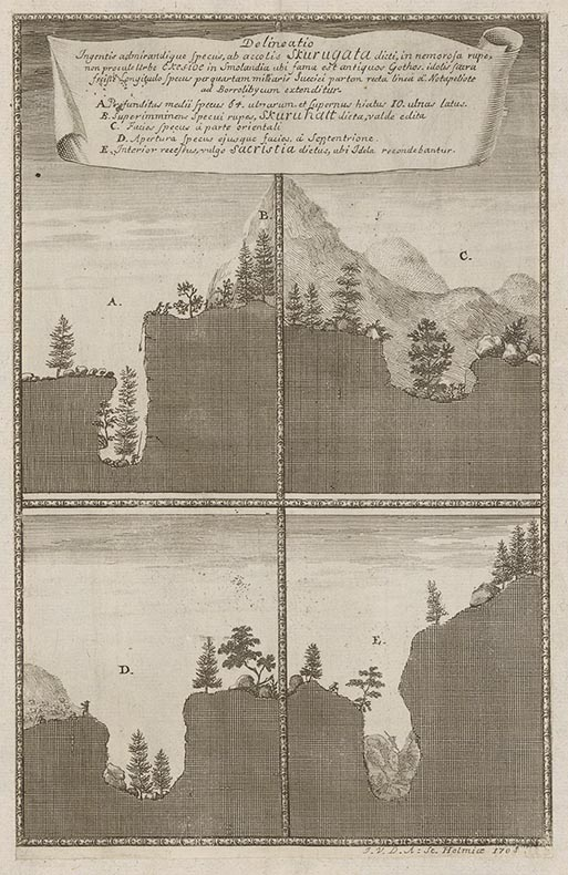 Titel i svensk övers. : En stor och underlig klyfta i ett skogsklätt berg, Skurugata, icke långt från staden Eksjö i Småland, där de gamla göterna enligt sägen offrat åt sina gudar. Klyftans längd sägs vara en fjärdedels svensk mil